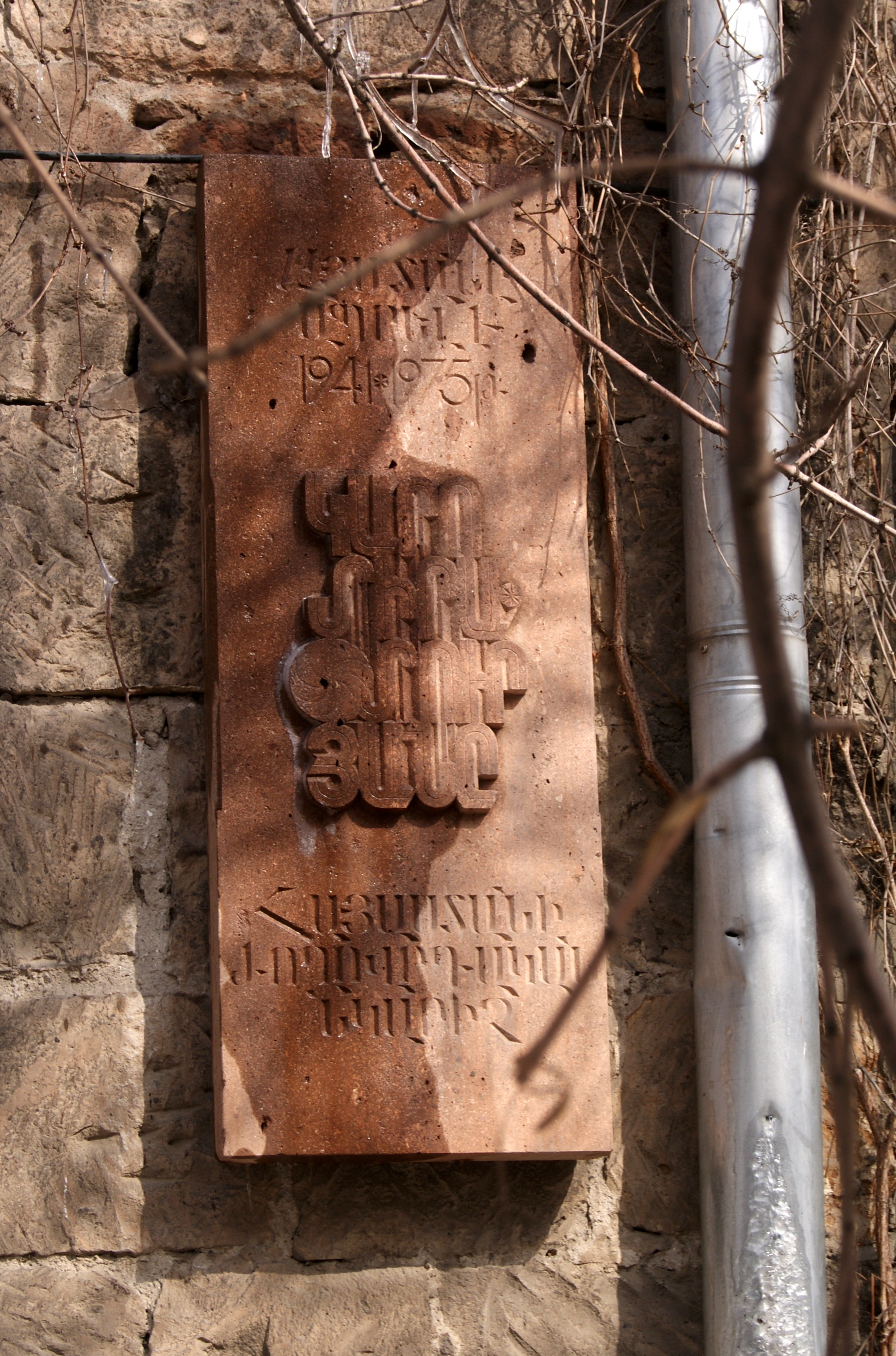 Karapet Tiraturyan's plaque